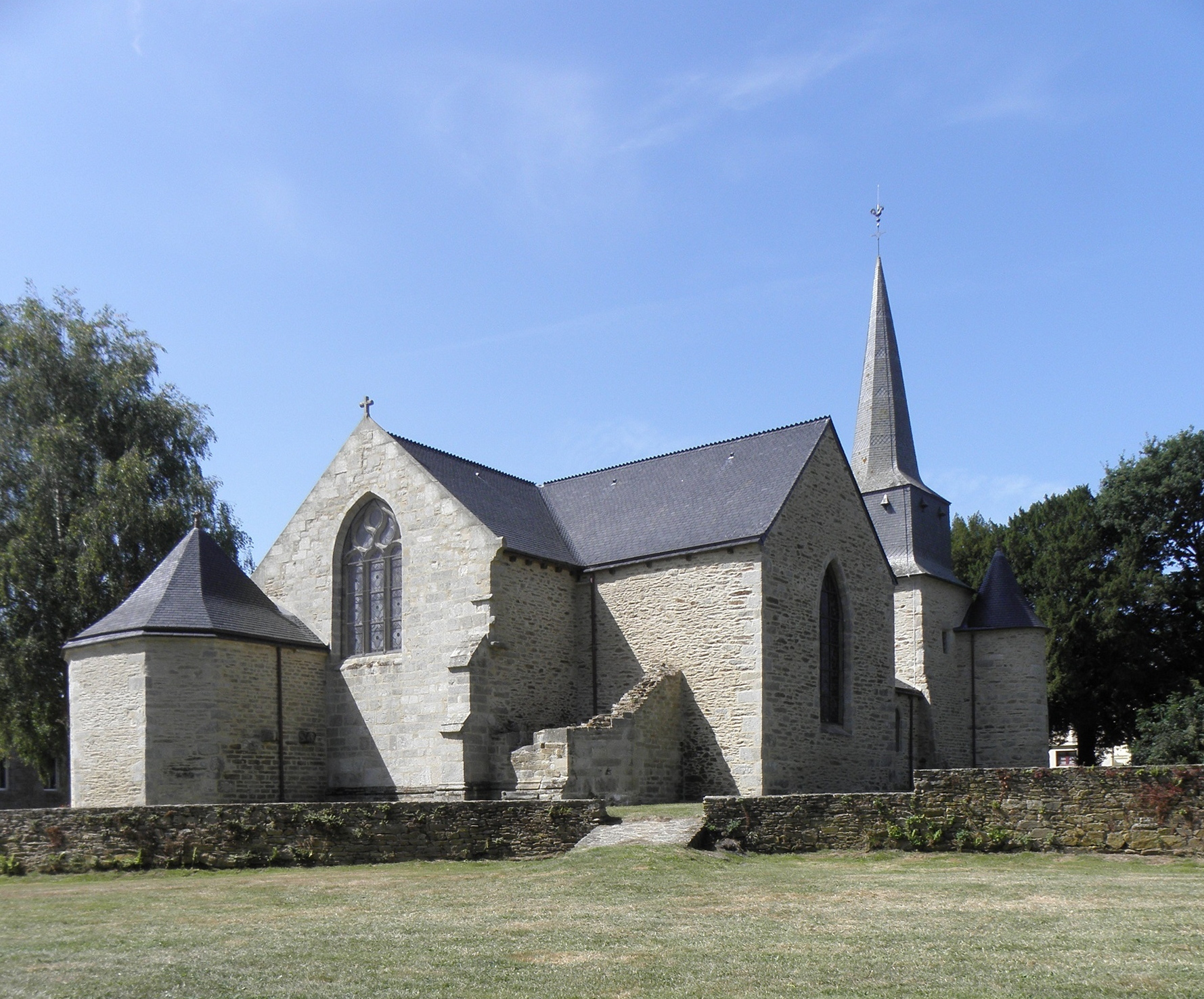 Église Saint-Pierre sise au Vieux-Bourg de Plouguenast (22). Chevet et flanc nord.